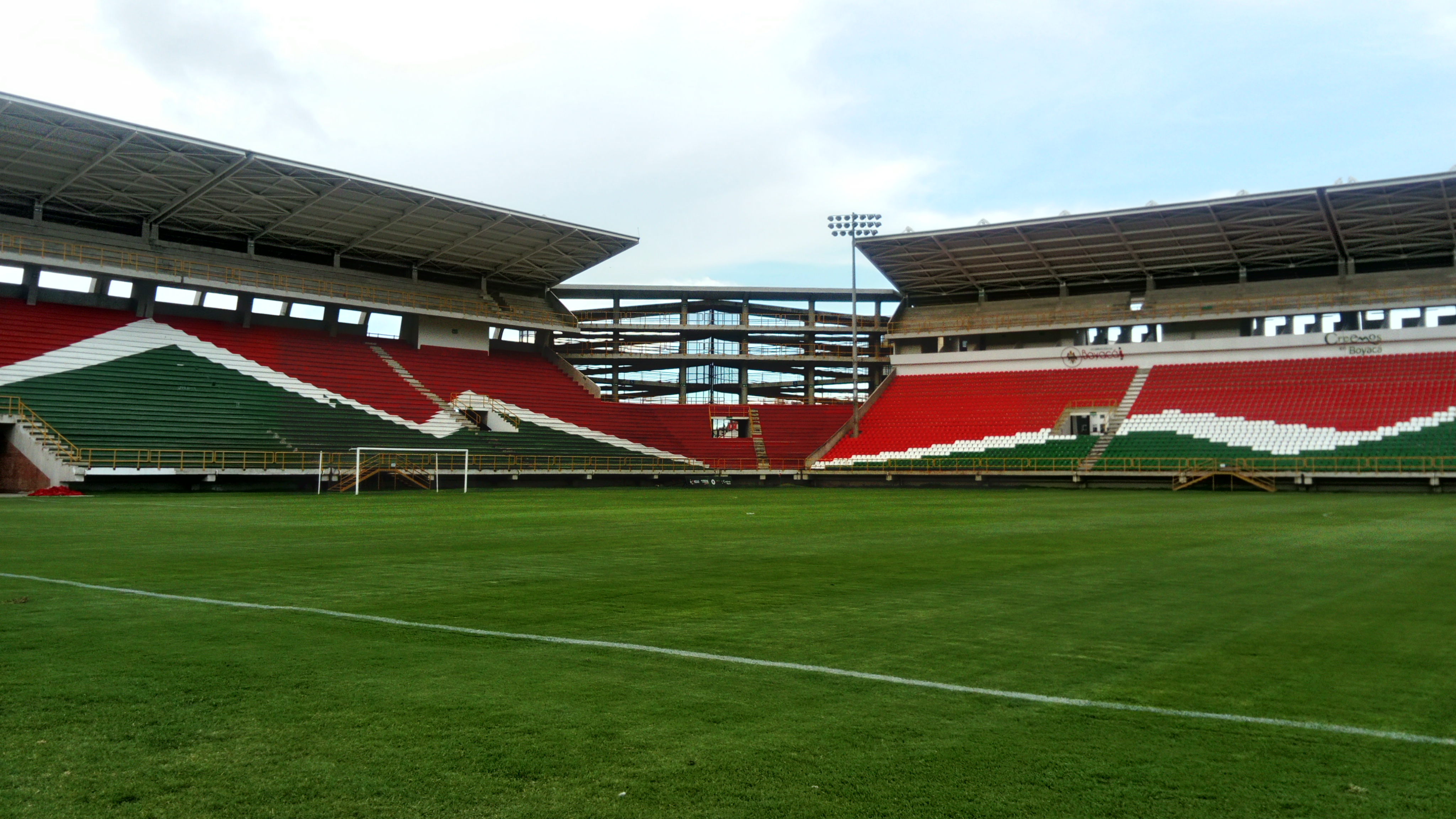 La vista de la tribuna Norte y Oriental del Estadio la Independencia (Foto capturada con celular por Henry Leonardo López Mora, desde el interior de la grama).